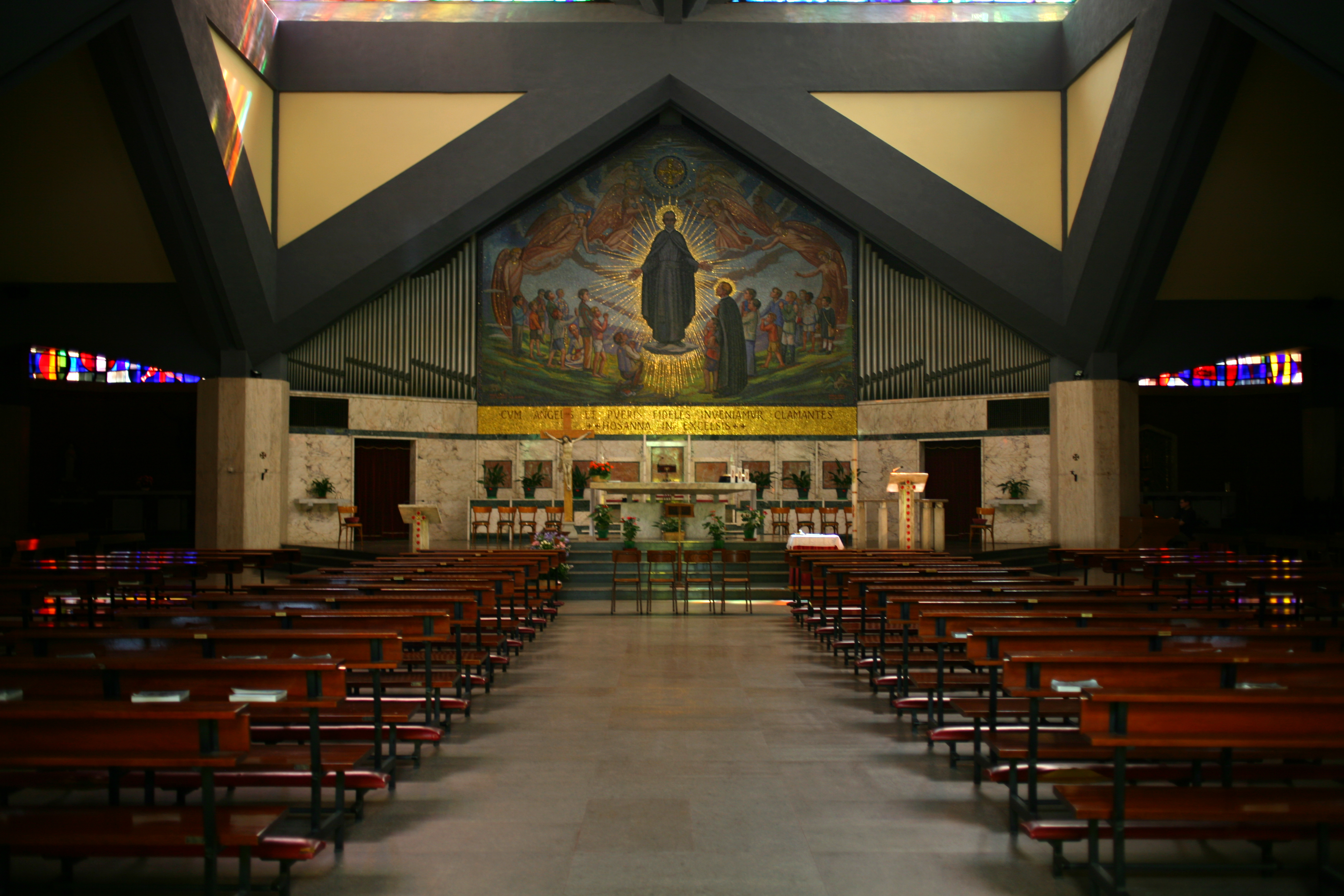 San Giuseppe Calasanzio mosaico (Milano)